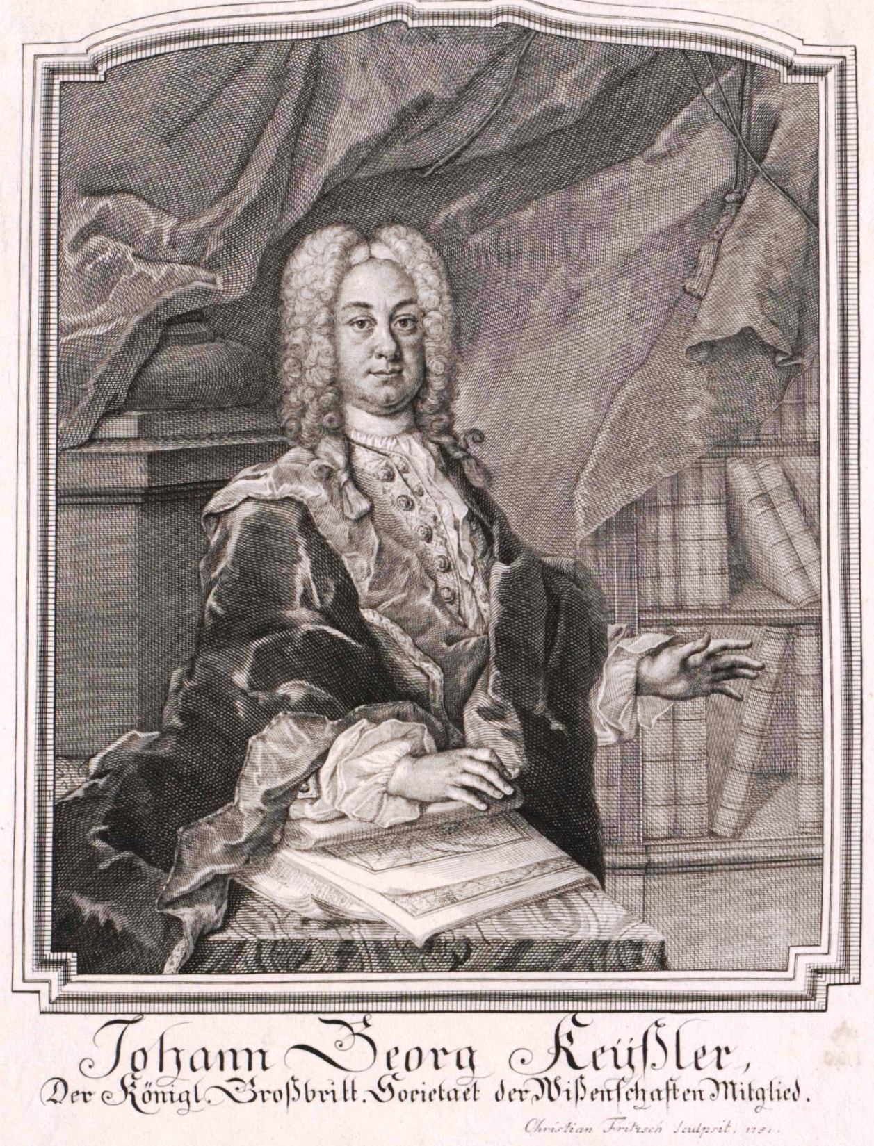 Johann Goerg Keyßler (1693–1743)